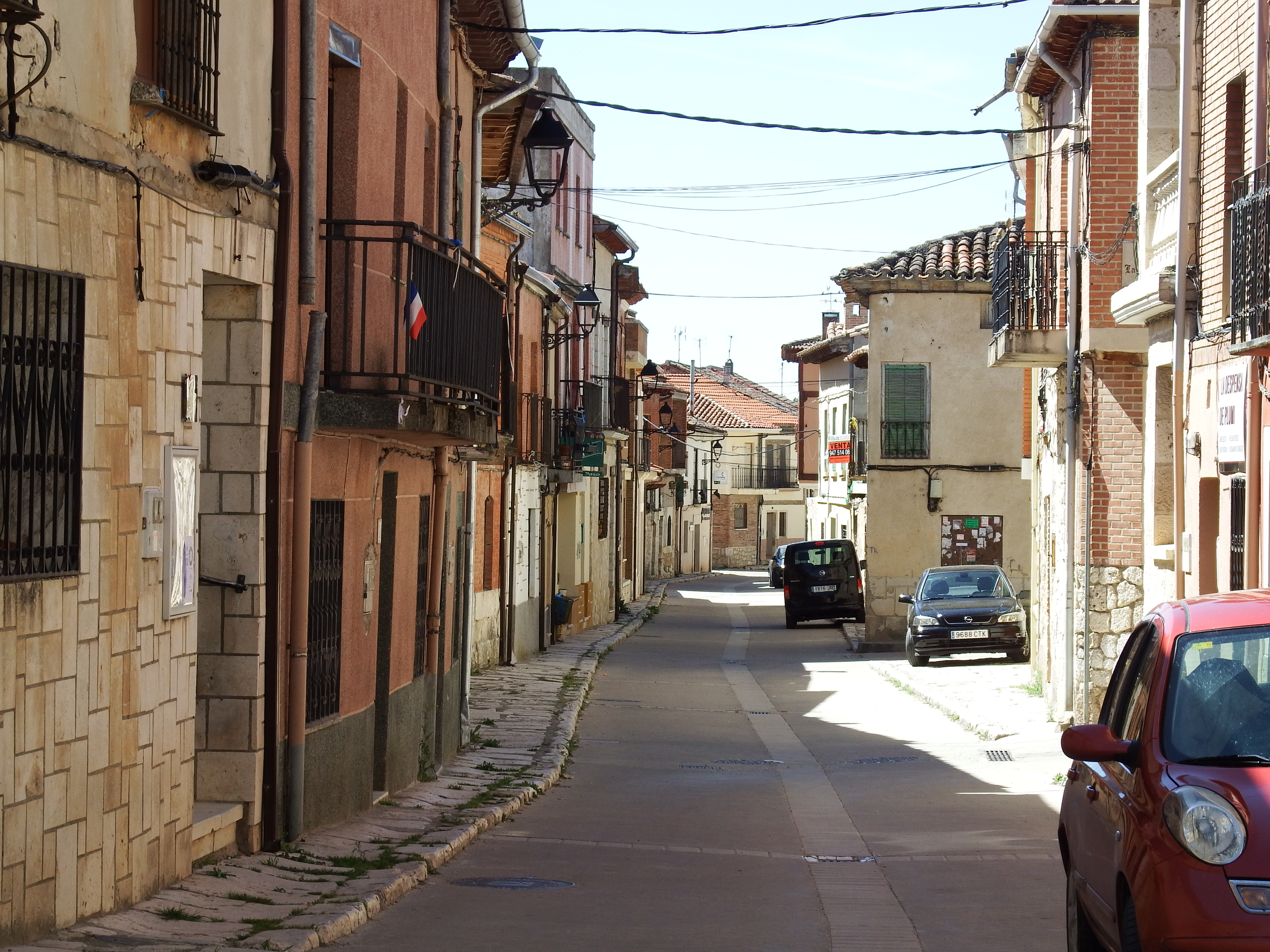 Sotillo de la Ribera